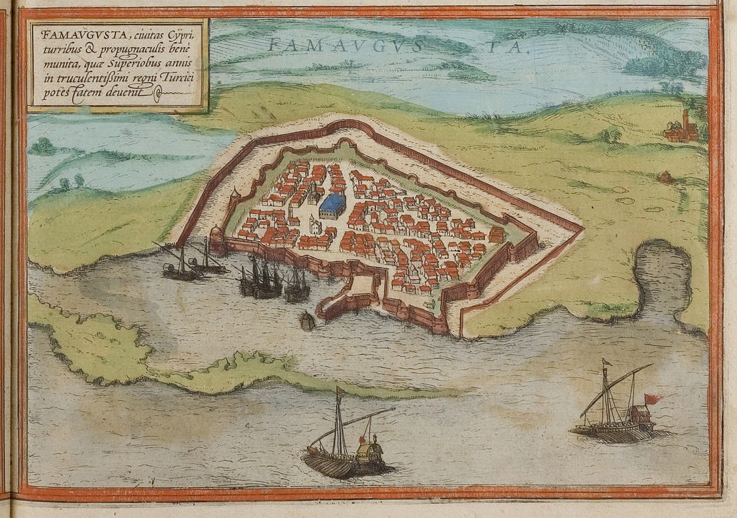 Famagusta